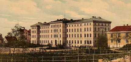 Skeppsgossekasernen i Karslkrona